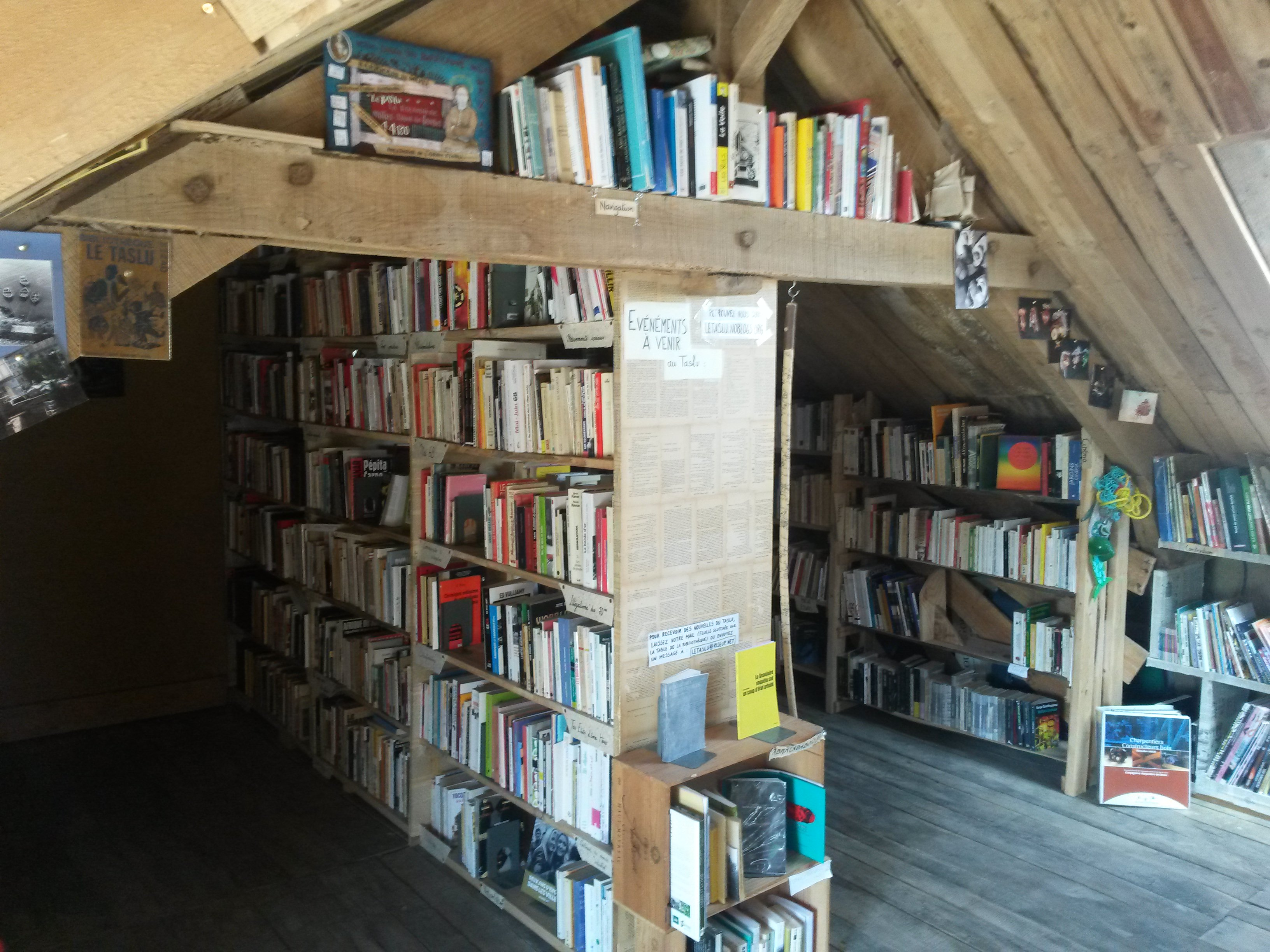 Bibliothèque de la ZAD à la Rolandière